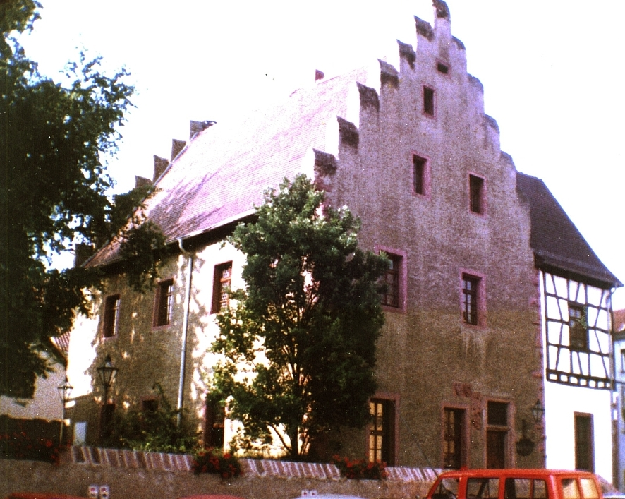 Freihof in Wiesloch, Sitz der Ritter von Sickingen